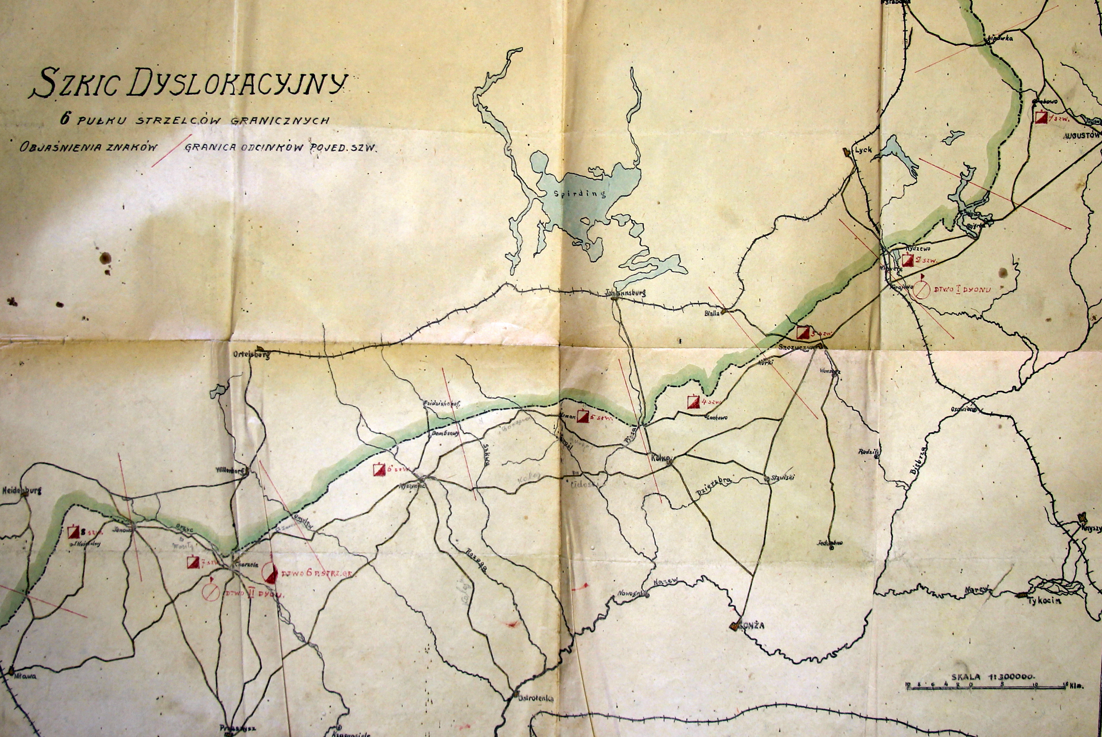 Rozmieszczenie 6 pułku Strzelców Celnych - IX 1920